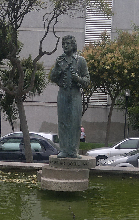 Estatua de Pucho Boedo no barrio do Ventorrillo, na cidade da Coruña (Galiza).